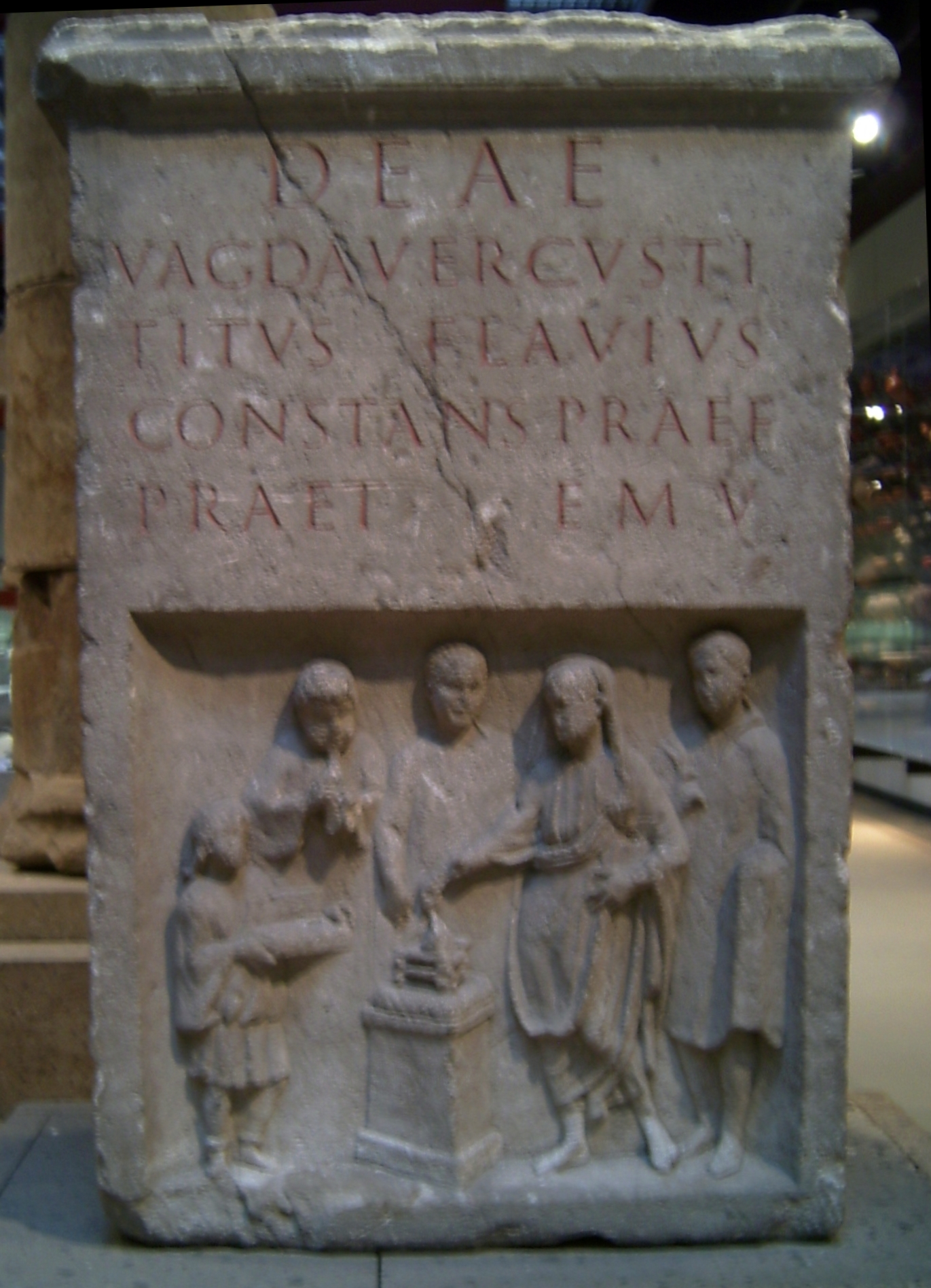 References: CIL 13, 12057 = RSK 00146 = IKoeln 00207 = D 09000 = AE 1910, 00067 = AE 2003, +01216 For other images, see gallery Römisch-Germanisches Museum.